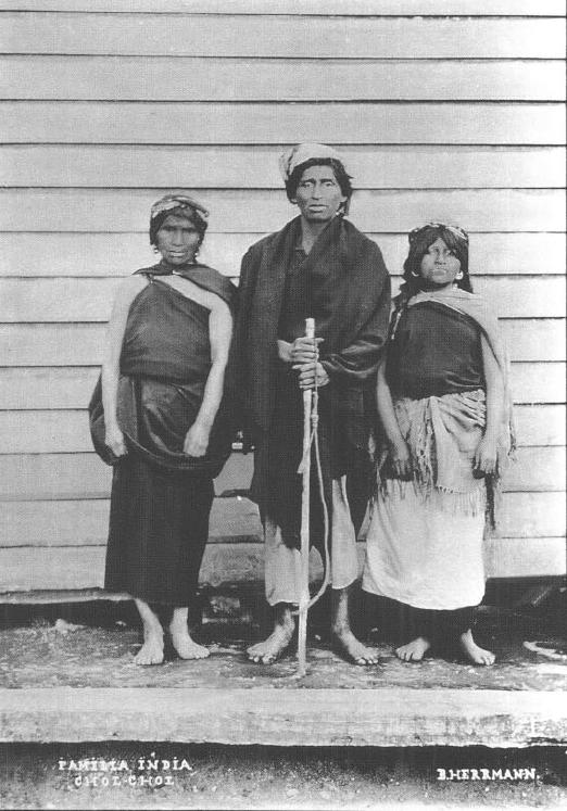 "Familia india. Chol-Chol. B. Herrmann"